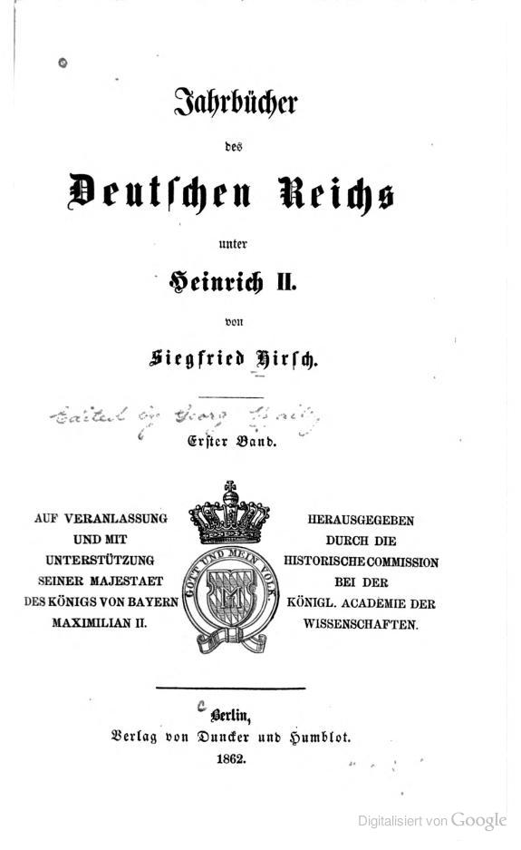 Jahrbücher des Deutschen Reichs unter Heinrich II.